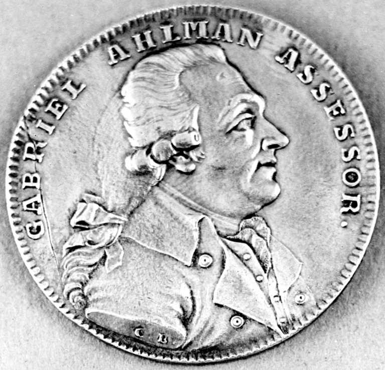 Muistoraha halkasia 3cm Merkinnät muistorahassa: GABRIEL AHLMAN ASESSOR., USQVE BENEFICUS, IN MEMORIAM SOCII MUNIFICI R. SOCIET OECON FENN 1801.